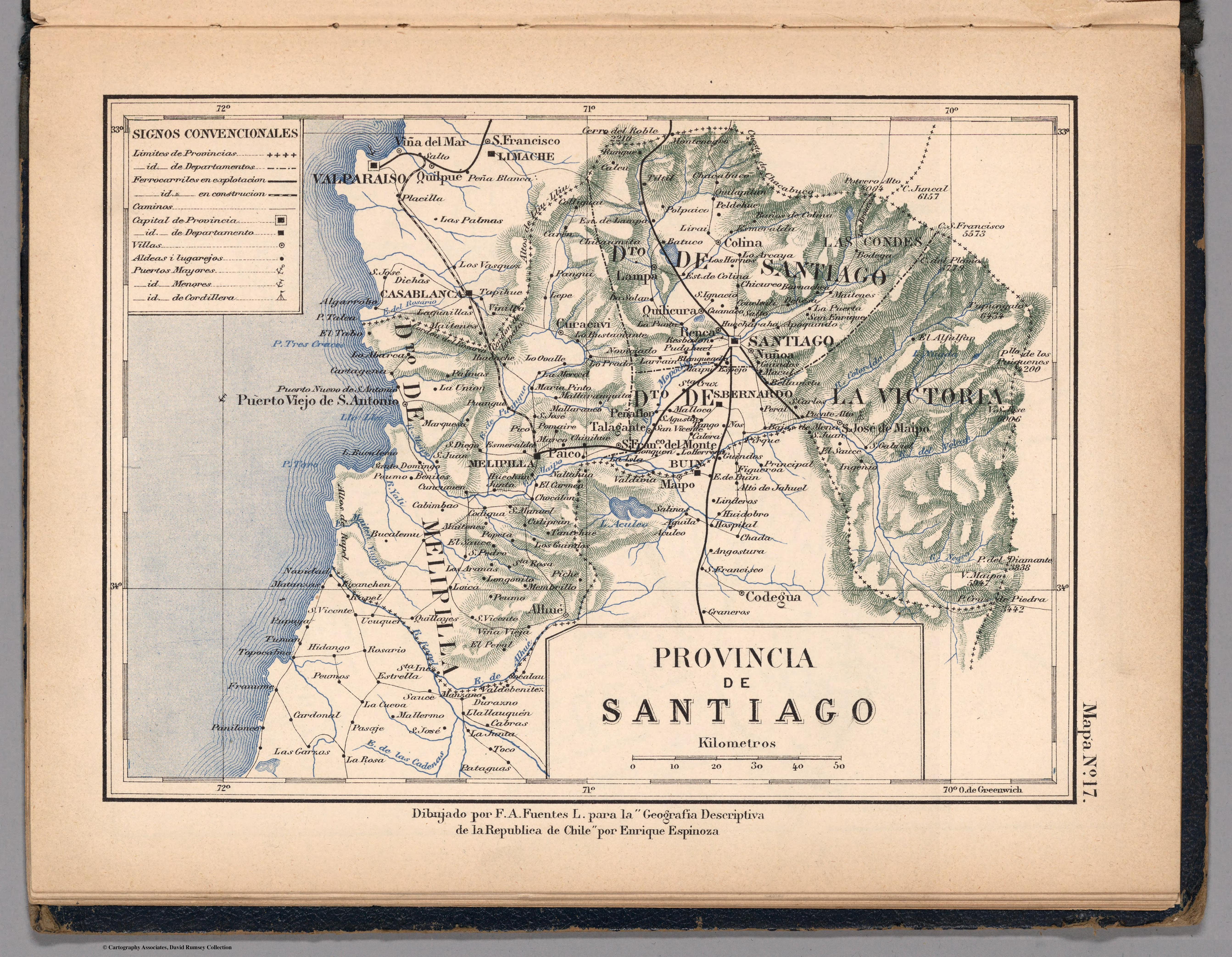 Atlas de Chile Arreglado para la Jeografia Descriptiva de la Republica de Chile por Enrique Espinoza.